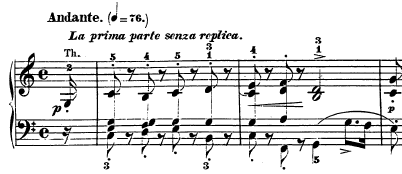 Compassos iniciais do segundo movimento da Sonata Op. 14 número 2 de Beethoven